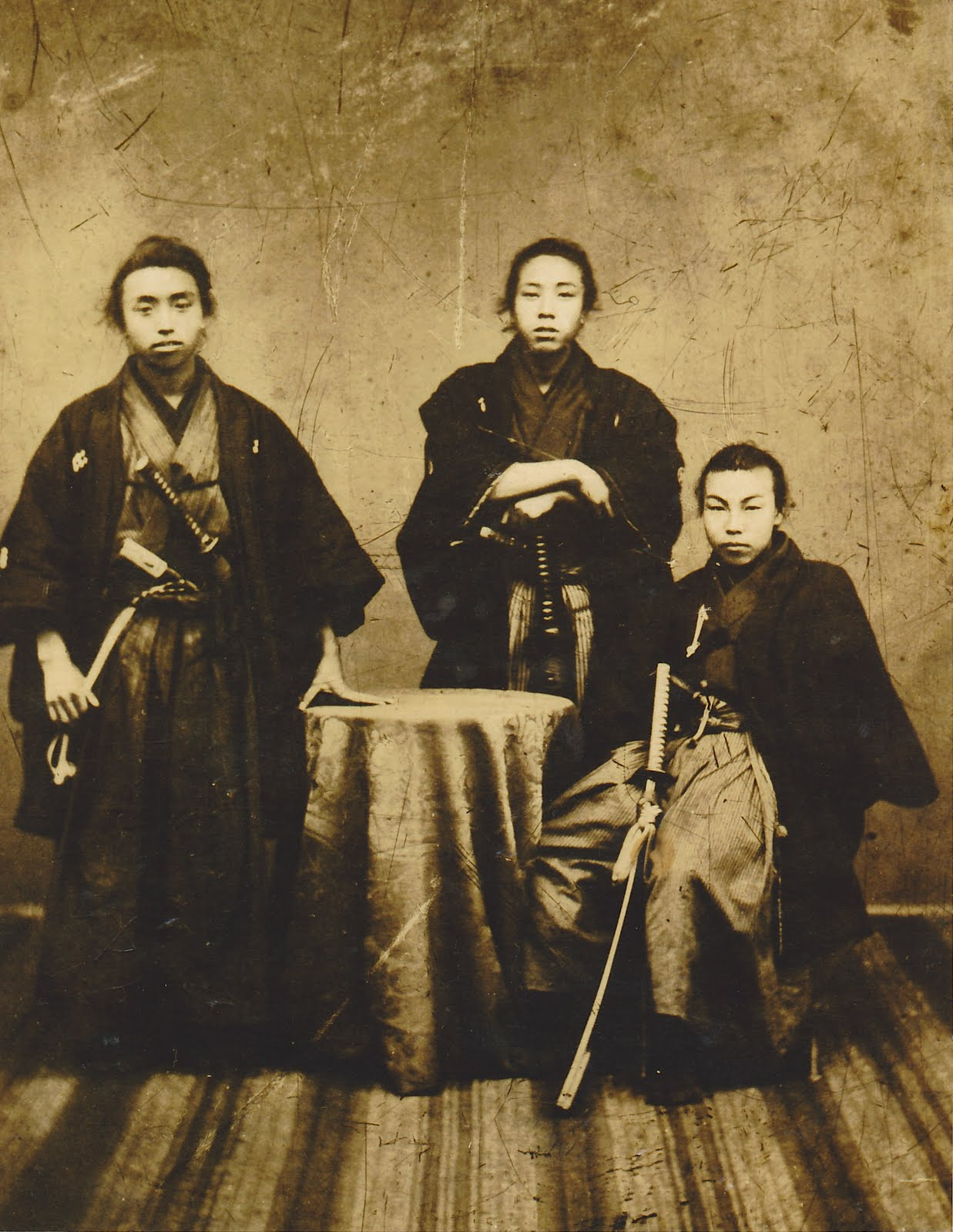 菊池九郎（きくち・くろう、慶應義塾卒業。）写真右・間宮斉、中・菊池九郎、左・武藤雄五郎。